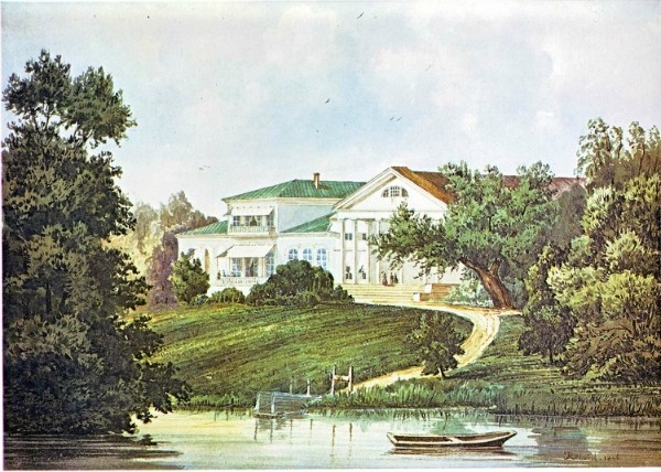 Старый дом в усадьбе Авчурино. 1846г Бумага, акварель. 18,2х25,5 Лист из альбома "Виды села Авчурина 1792-1868 - See more at